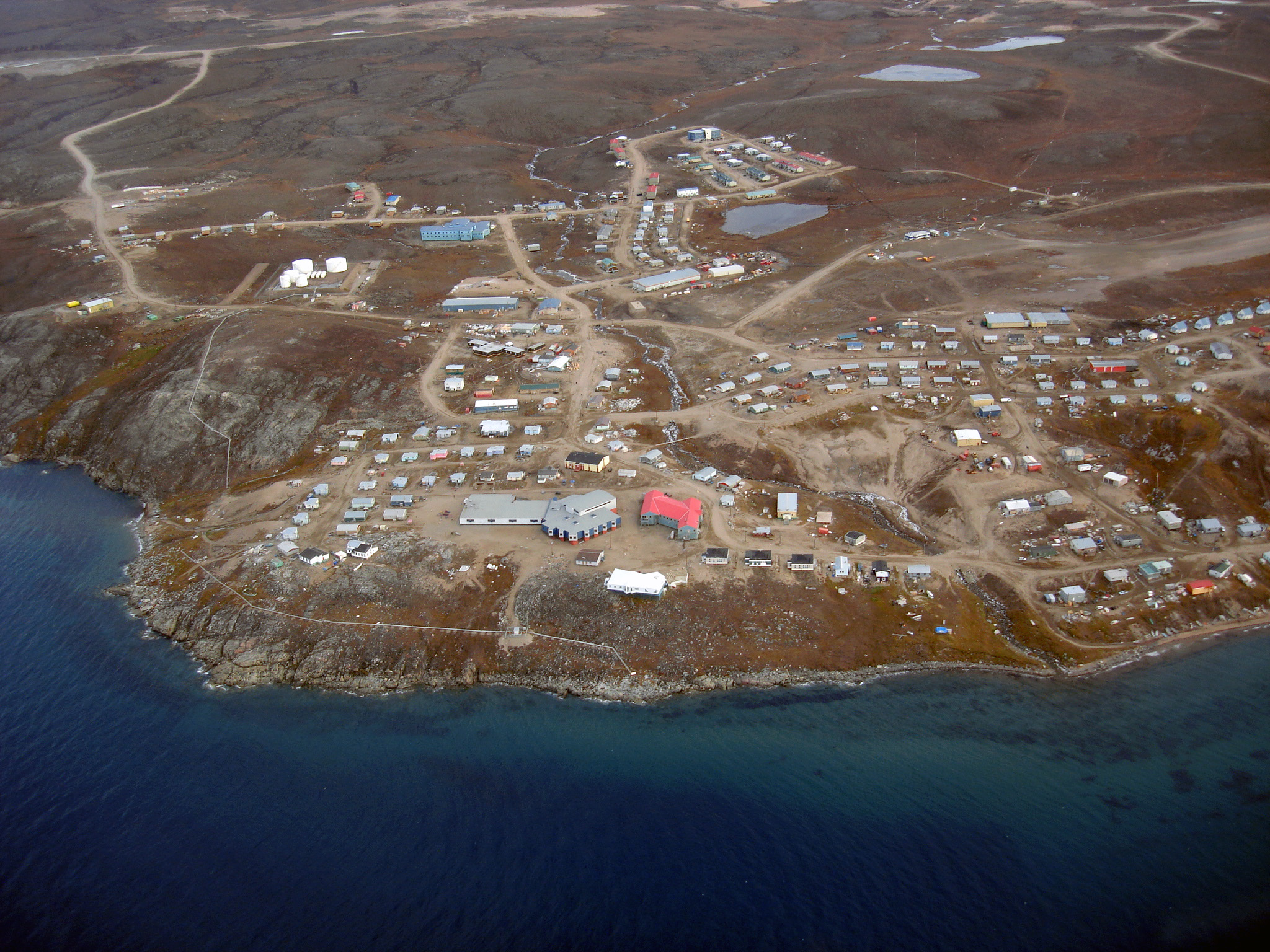 Pond Inlet à vue d'hélicoptère